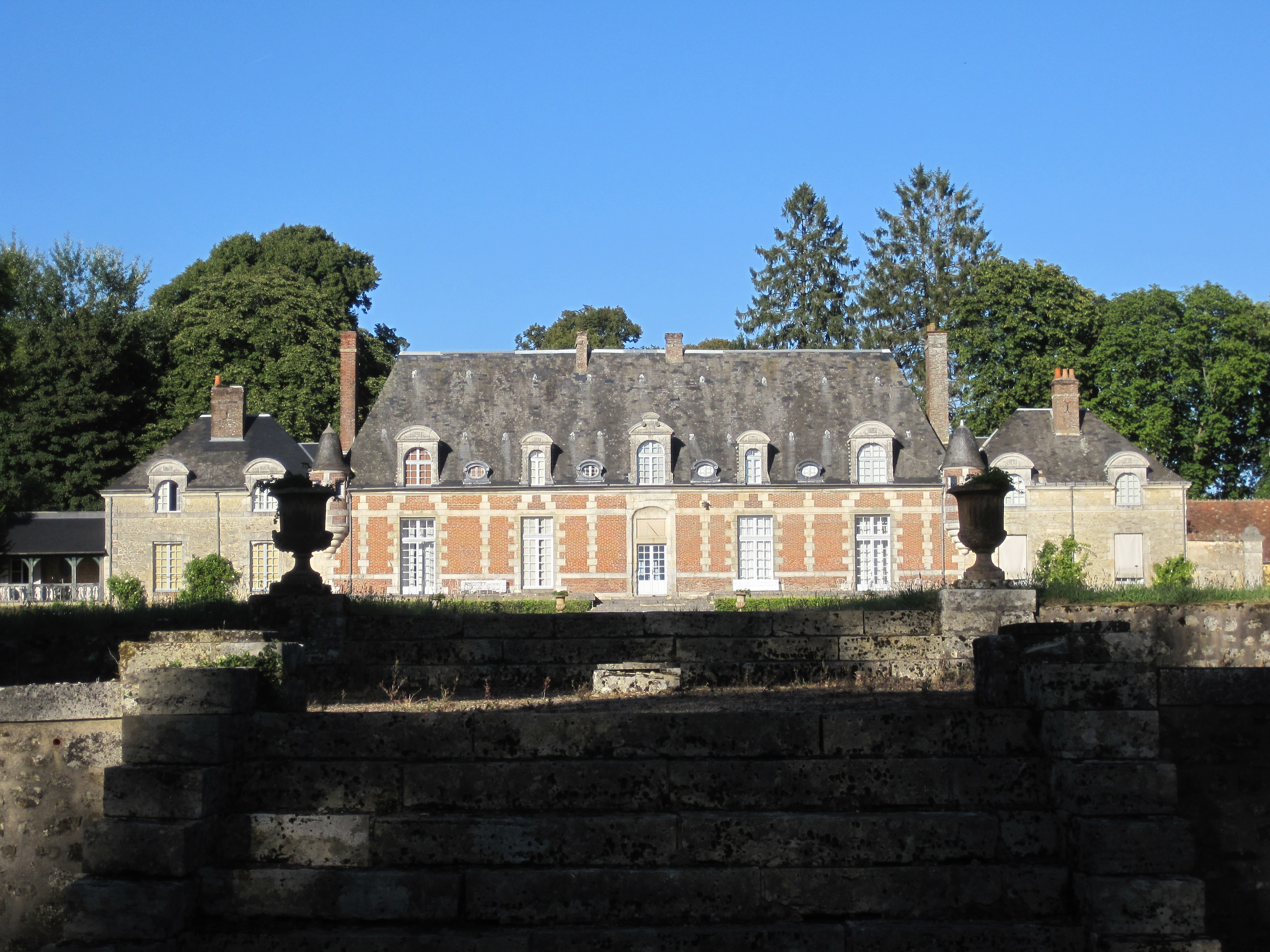 Façade du château du Tertre à Sérigny, dans l'Orne. .